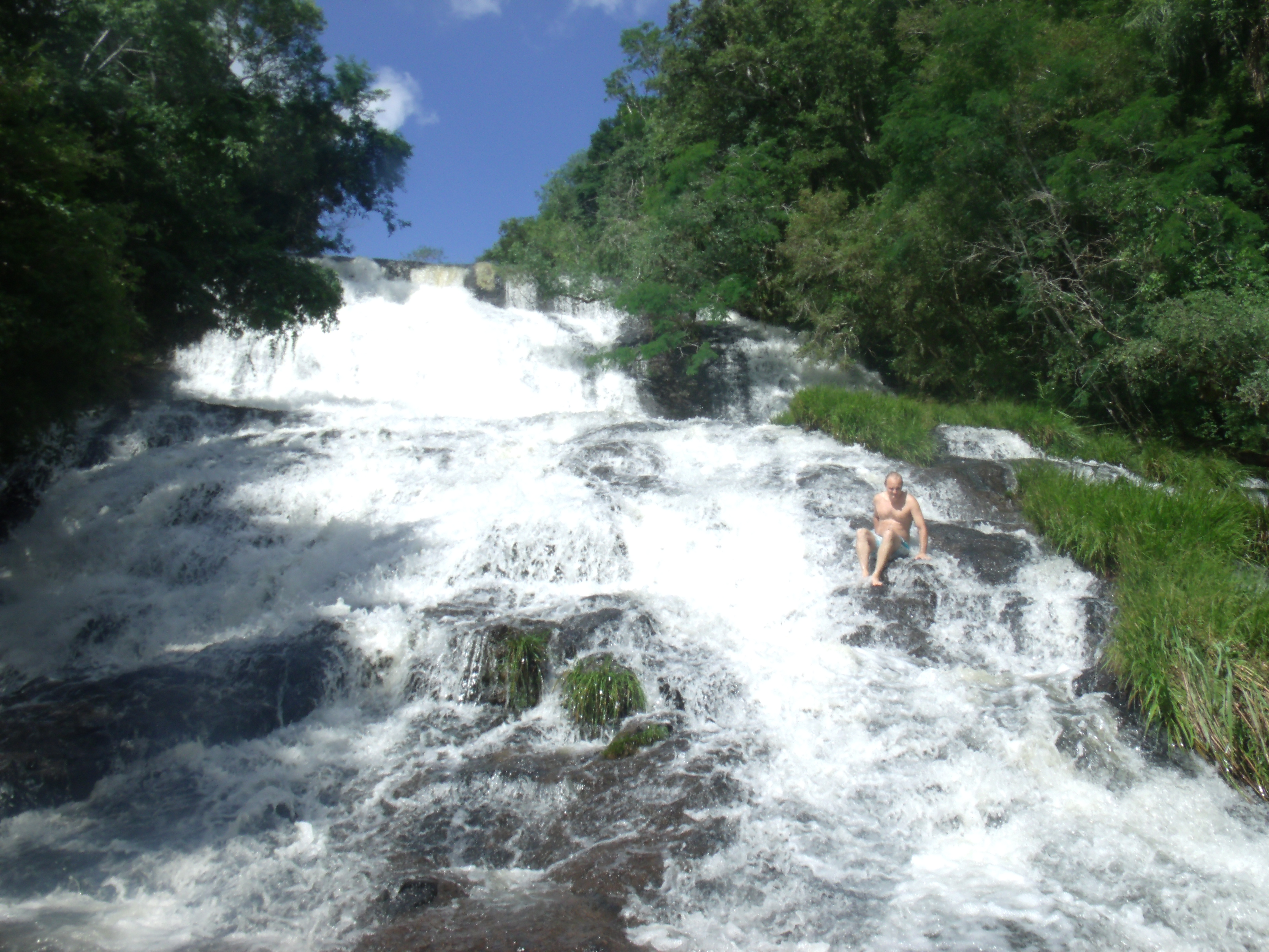 Vista del Salto Piedras Blancas desde la parte inferior, se aprecia el color blanco de la espuma que otorga el nombre al salto.